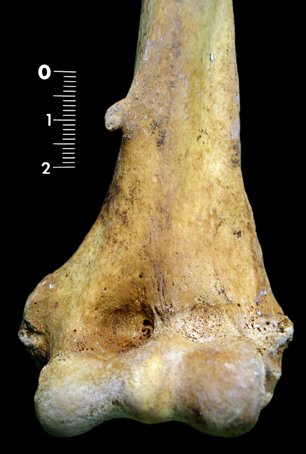 humérus humain avec une apophyse sus-épitrochléenne